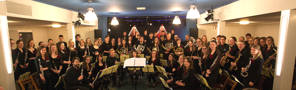 Groepsfoto van QHarmony in maart 2015.